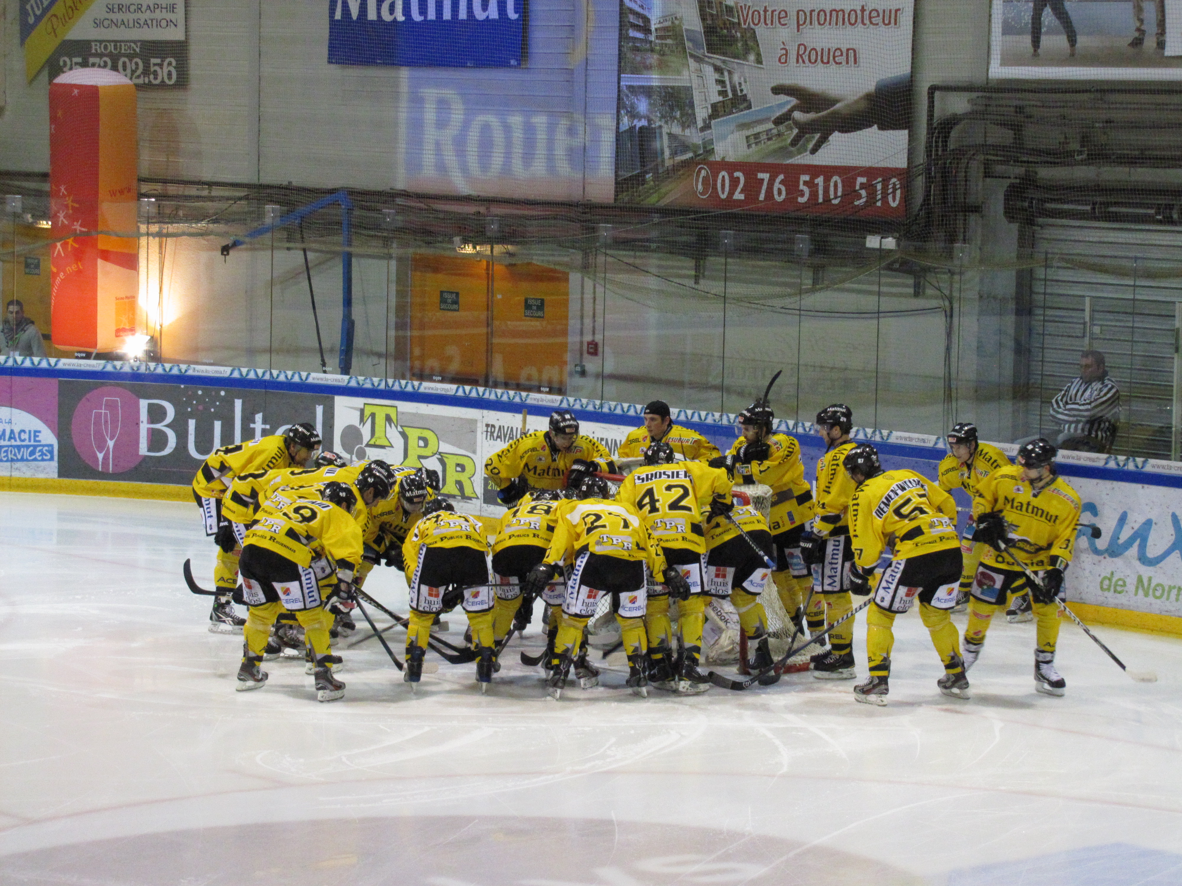 Les Rouennais avant le début du match lors de la Coupe Continentale de hockey 2012